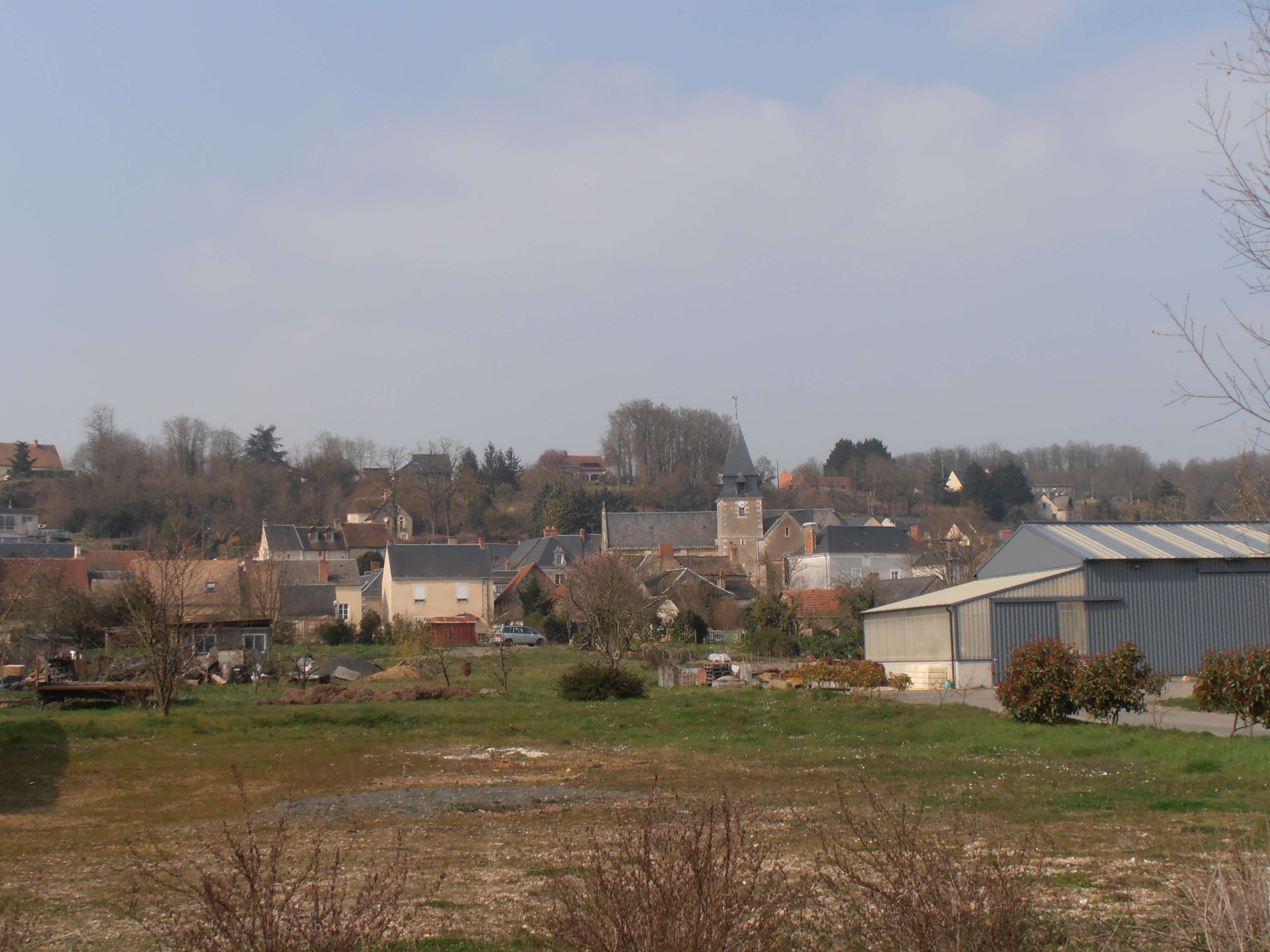 Vue de Mareil en contrebas du village